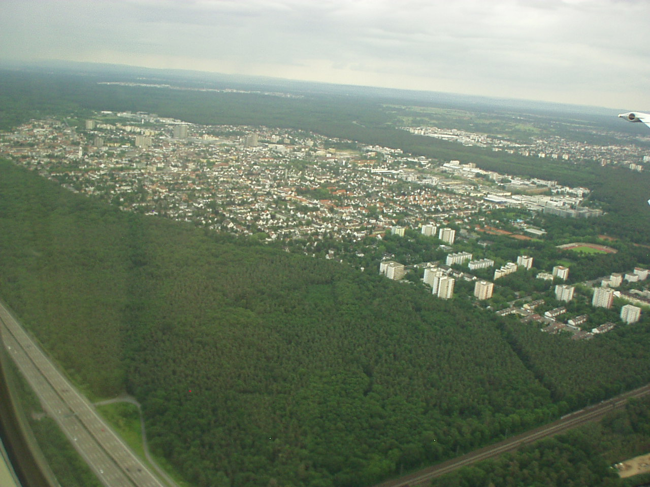 Neu Isenburg